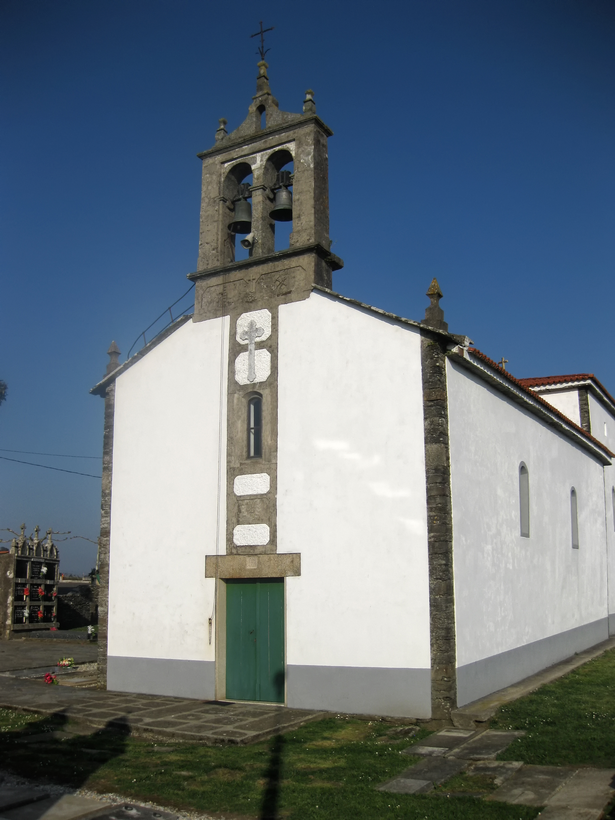 Igrexa de Santaia de Moar, Frades.